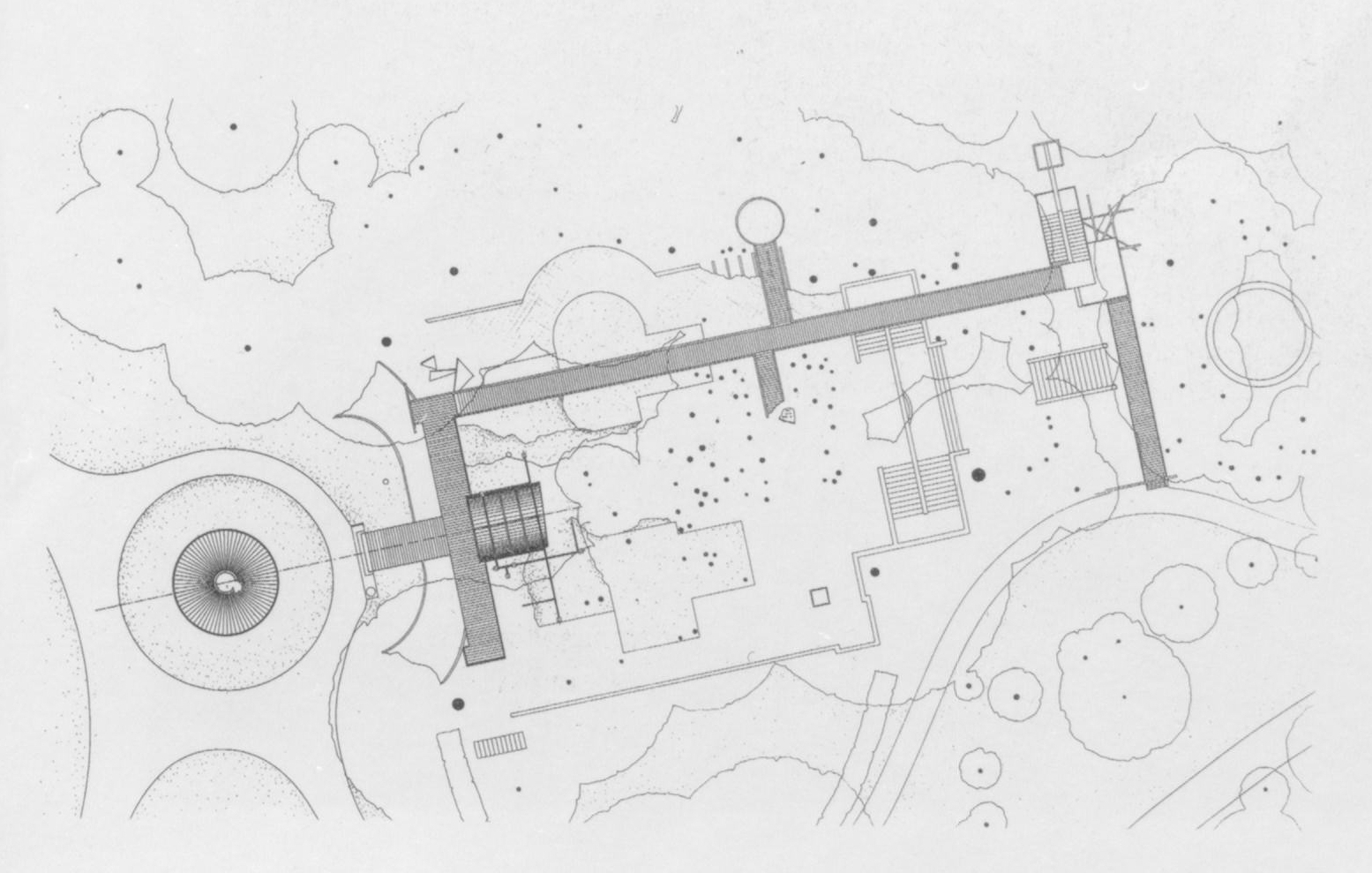 Hans Dieter Schaal: Lageplan der Kunststation Villa Moser, Stuttgart, 1993.